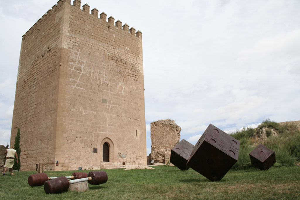 Original title: Castillo de Lorca